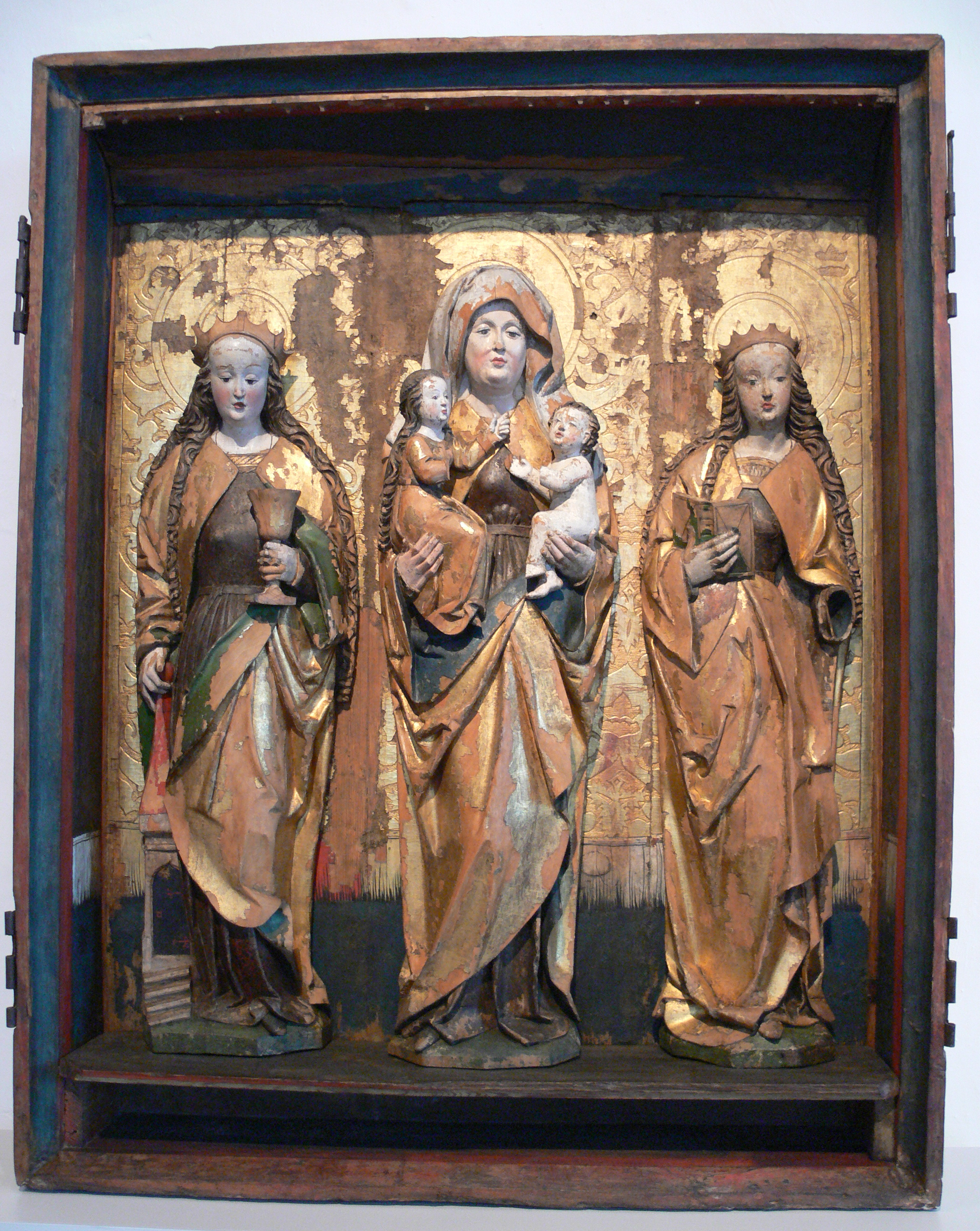 Altarschrein mit hl. Barbara, hl. Anna selbdritt und hl. Katharina von Alexandrien; aus Spansberg (Gde. Nauwalde) bei Riesa; Anfang 16. Jh., Schrein Nadelholz, Figuren Laubholz, originale Fassung Staatliche Kunstsammlungen Dresden, Skulpturensammlung, SAV 2703a-d (ausgestellt im Schloßbergmuseum Chemnitz)